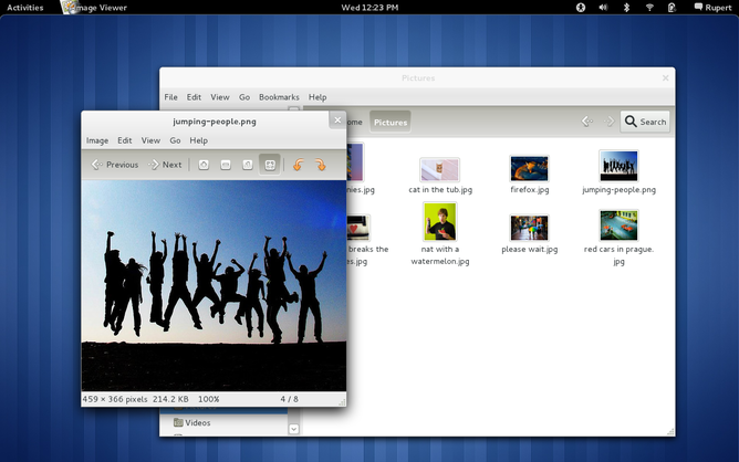 L'Interface de Gnome 3 avec Eye of Gnome et Nautilus d'ouvert